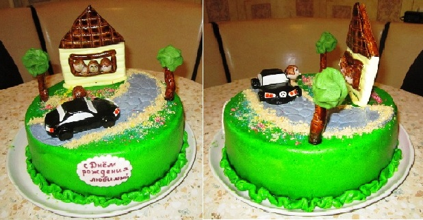 Торт ко Дню рожденья